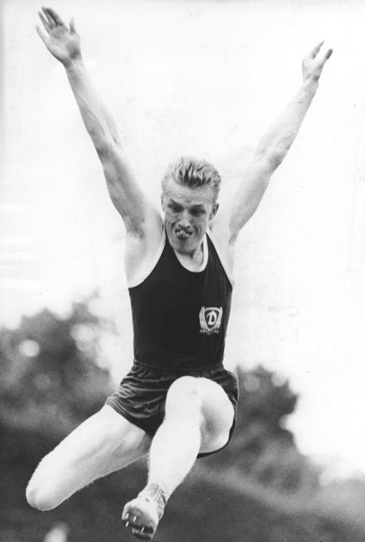 Klaus Beer Zentralbild Kohls-Wendorf 5.8.1962 Leichtathletiksportfest in Potsdam Im Potsdamer Leichtathletikstadion am Luftschiffhafen kam es am 4.8.1962 zu einer letzten Probe unserer Leichtathleten vor den Ausscheidungen gegen Westdeutschland in Prag und Malmö. UBz: In Weitsprung der Herren siegte Klaus Beer (SC Dynamo Berlin) bis 7,61 m.